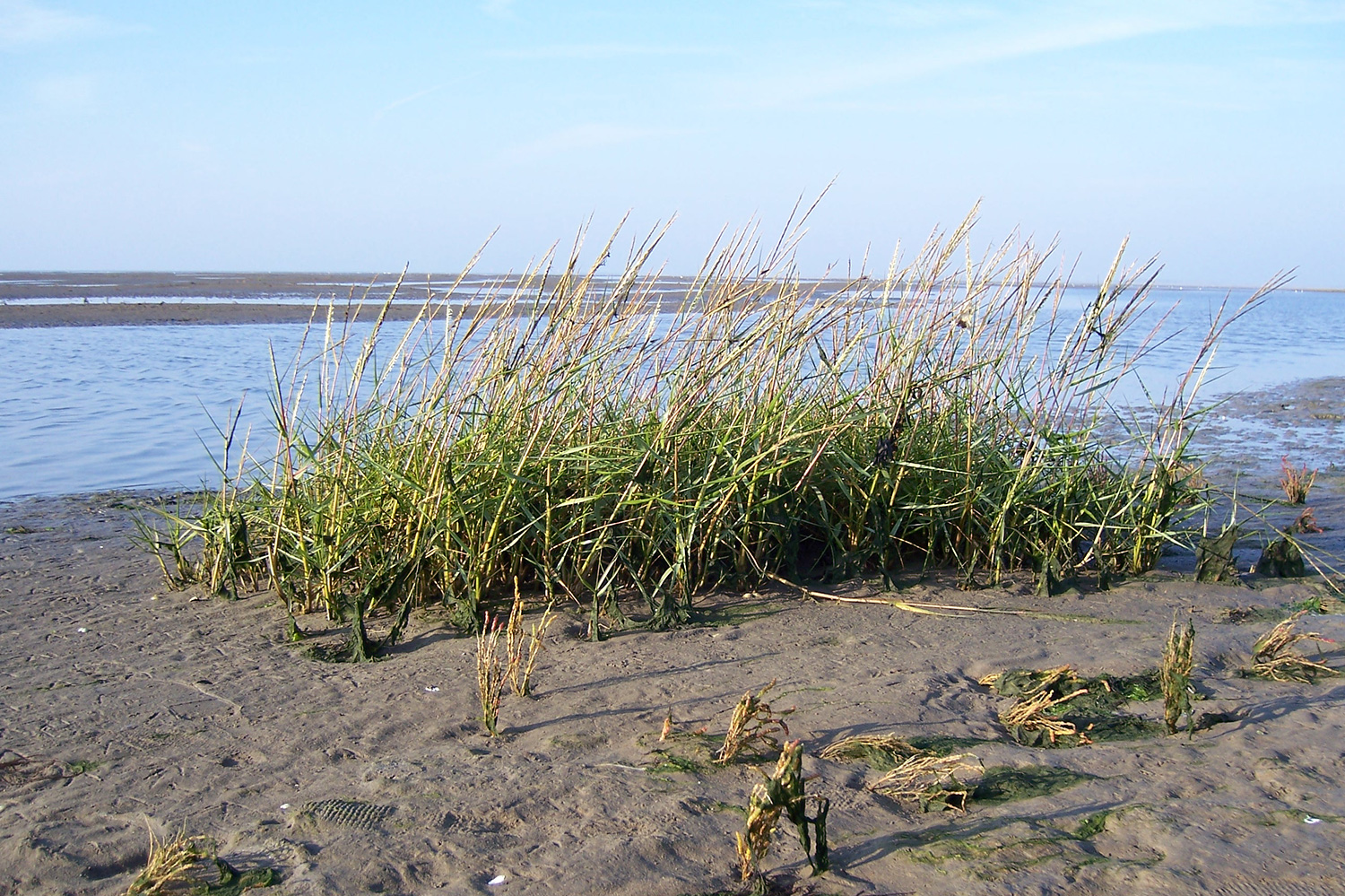 Nordseeinsel Spiekeroog: Horst des Schlickgrases Spartina (Spartina anglica) im Watt des Naturschutzgebietes